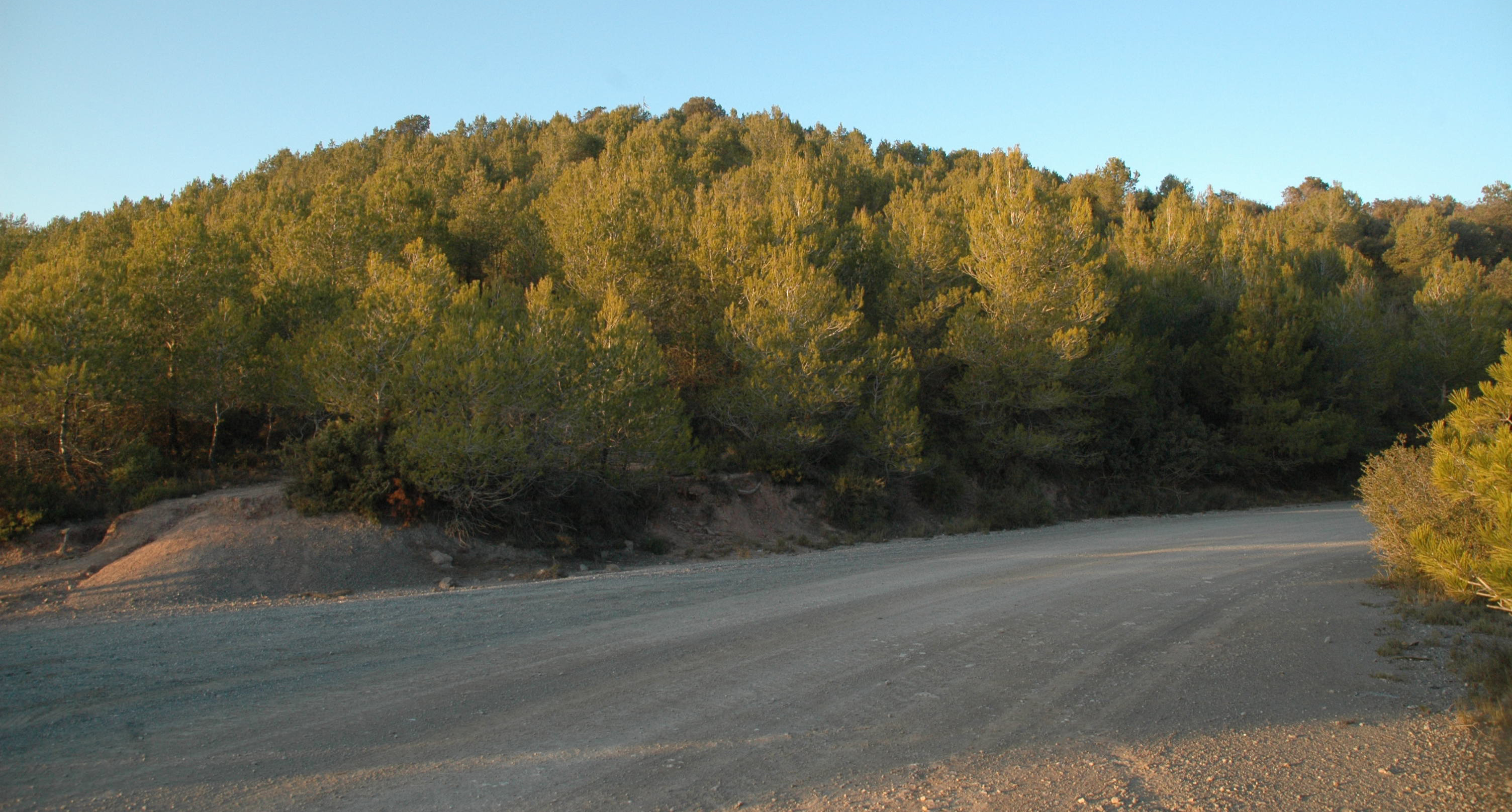 montanya del serrat de la Pineda (Bages)